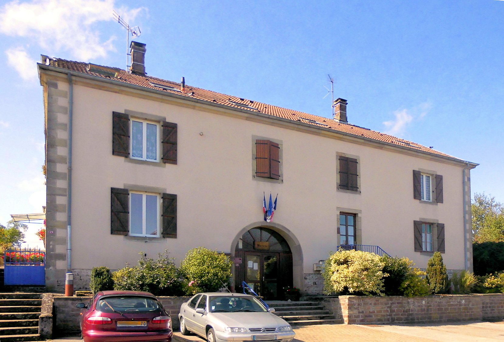 La mairie d'Alaincourt